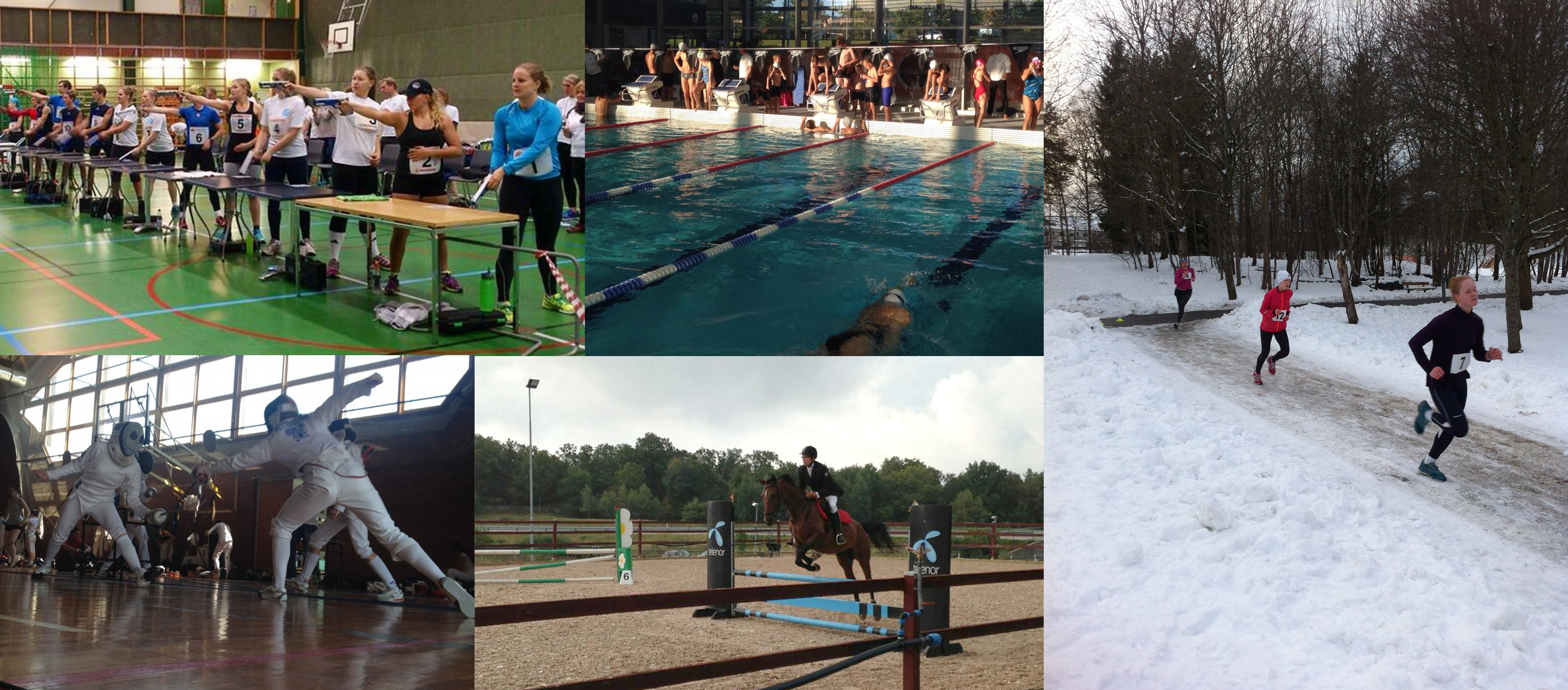 Collage över grenarna som ingår i modern femkamp